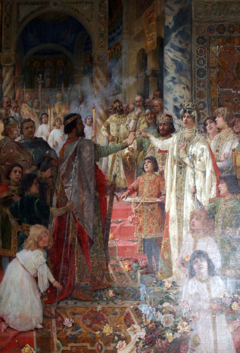 Zaruke hrvatskog kralja Zvonimira, rad Celestina Medovića u Hrvatskom institutu za povijest u ZagrebuKing Zvonimir engagement